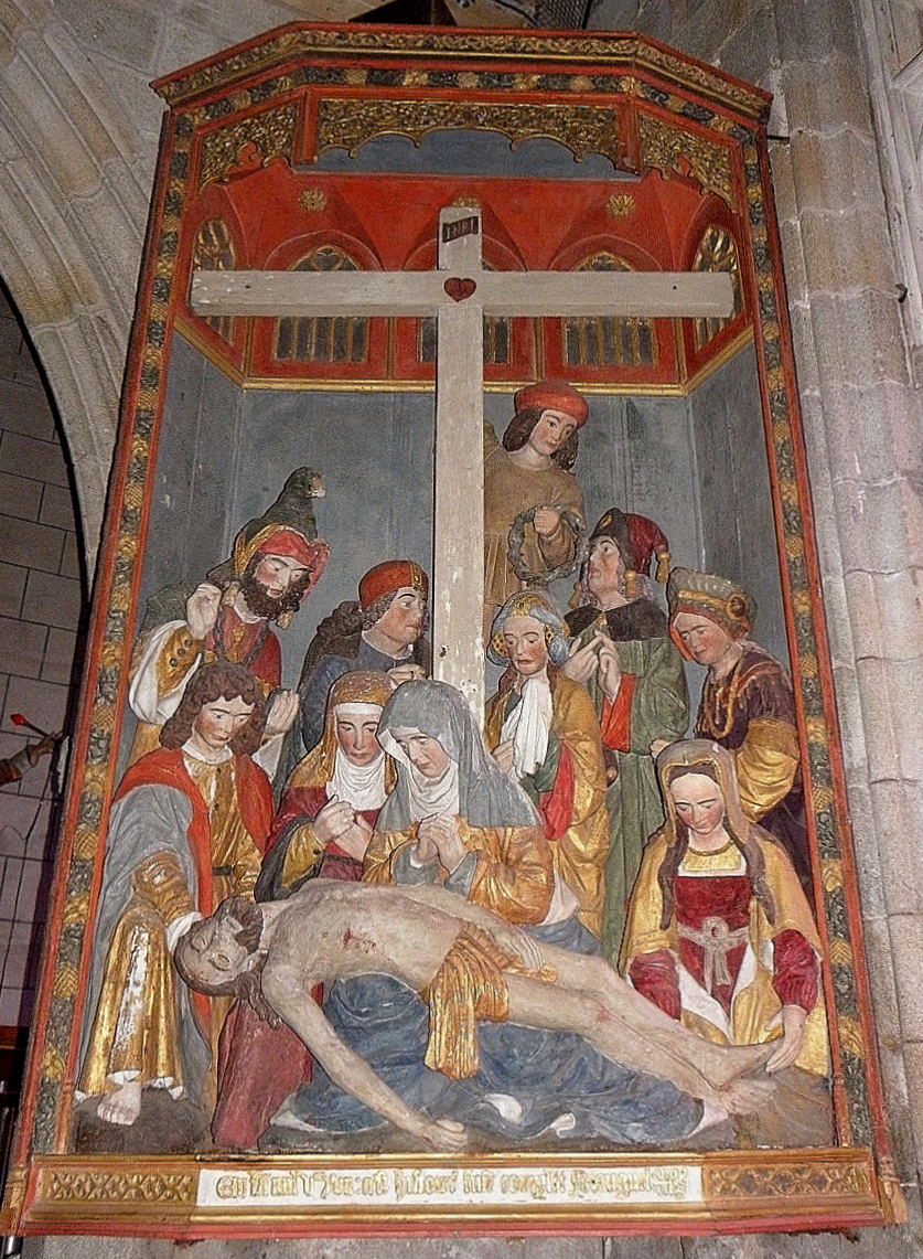 Descente de Croix de l'église Notre-Dame de Pencran (29).